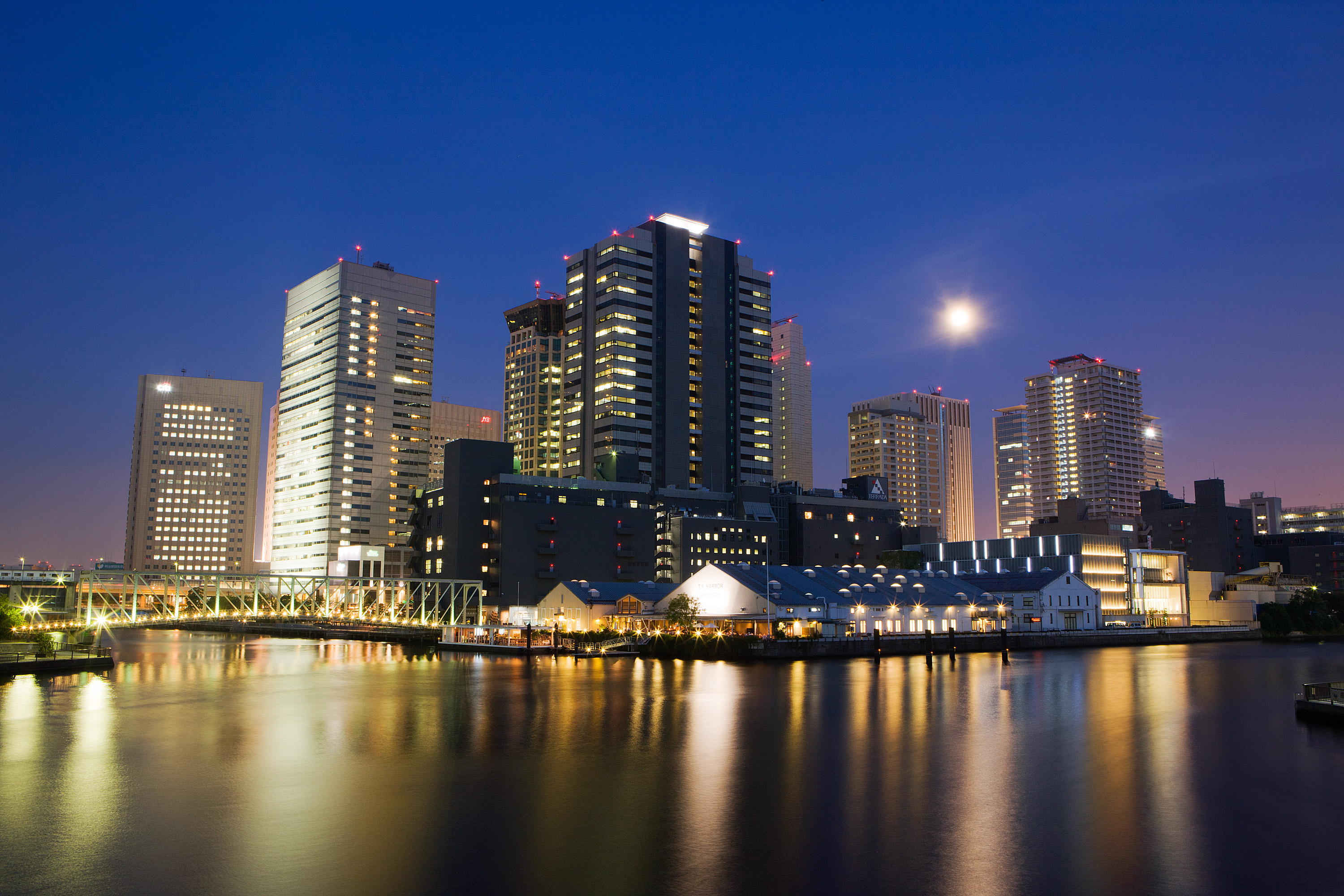 東京都品川区にある天王洲地区の夜景写真（対岸より撮影）